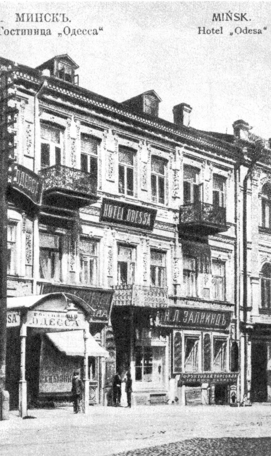 Отель Одесса на Захарьевской улице в Минске. Начало XX в.